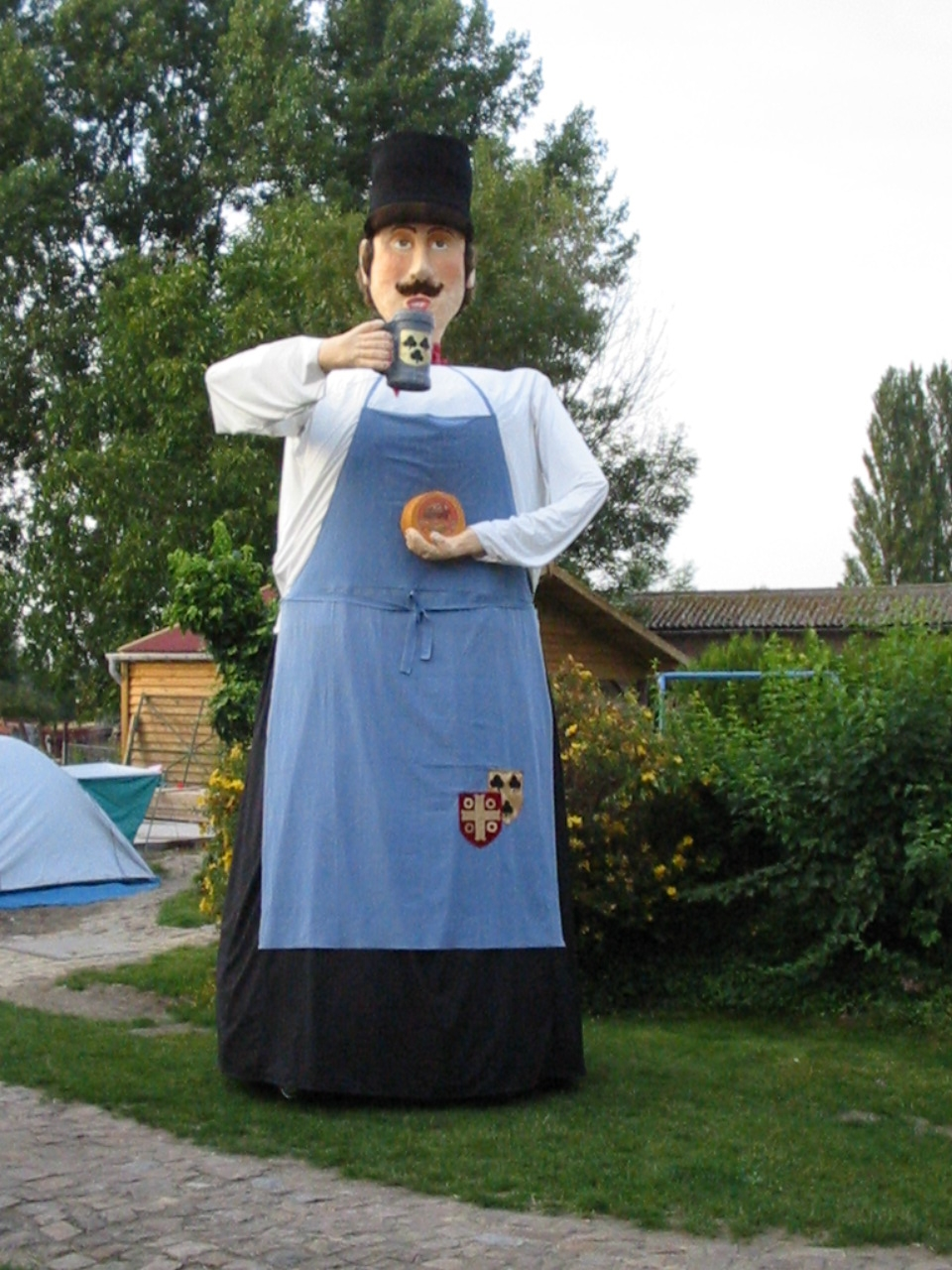 Géant de Mouchin Nord de la France.